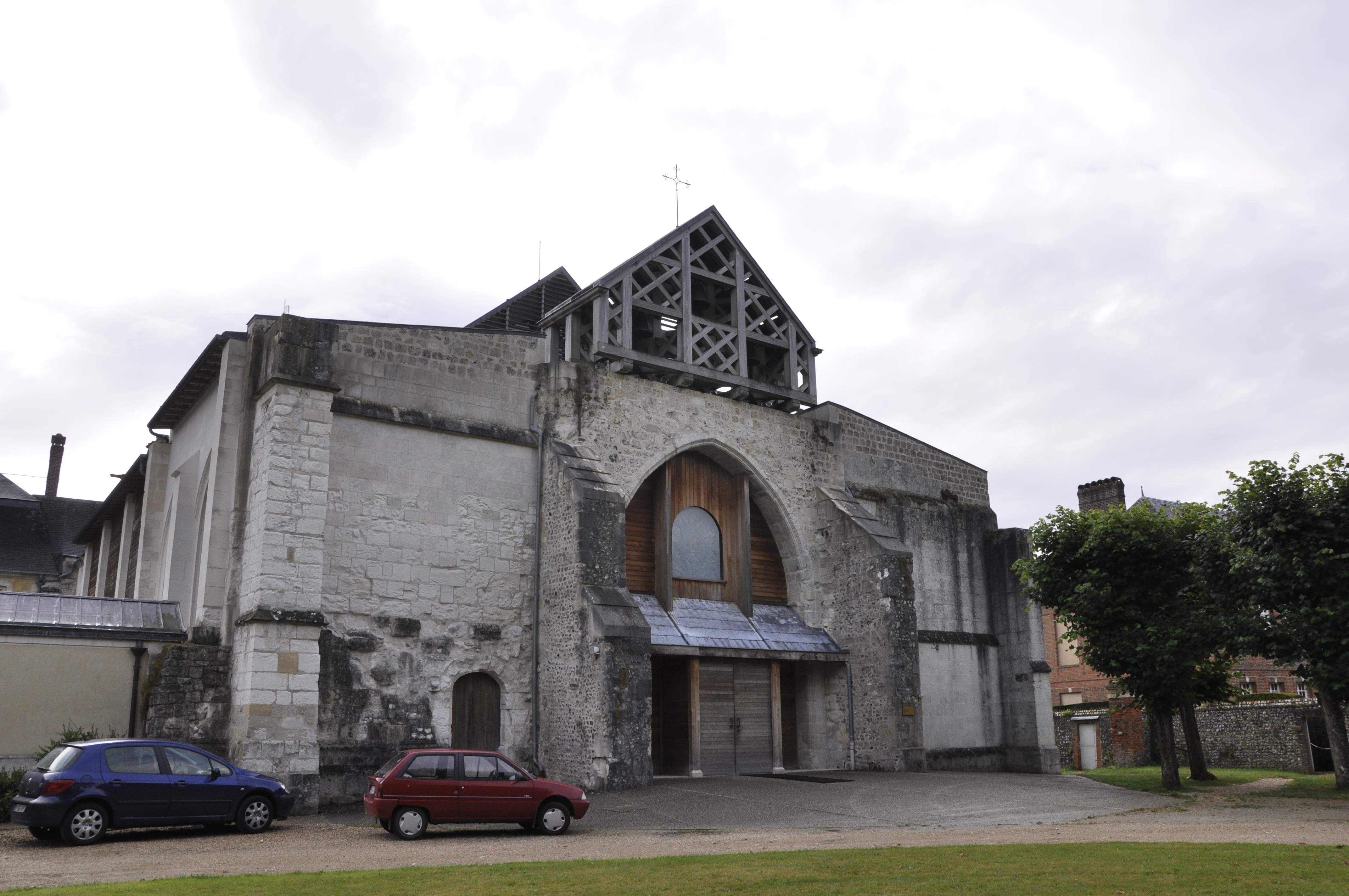 De abdij van Valmont, Frankrijk